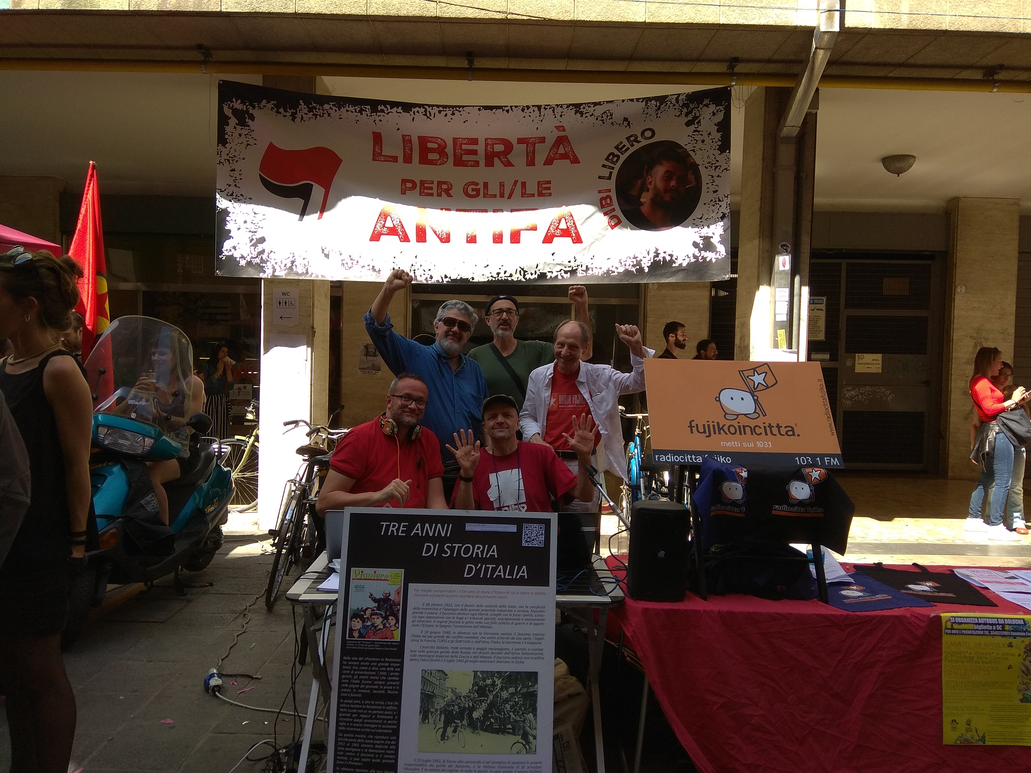 Radio Città Fujiko e il Comitato Ricerche Associazione Pionieri presentano la trasmissione radiofonica Fumetti a sinistra: un mondo dentro al balloon in occasione della festa della Liberazione